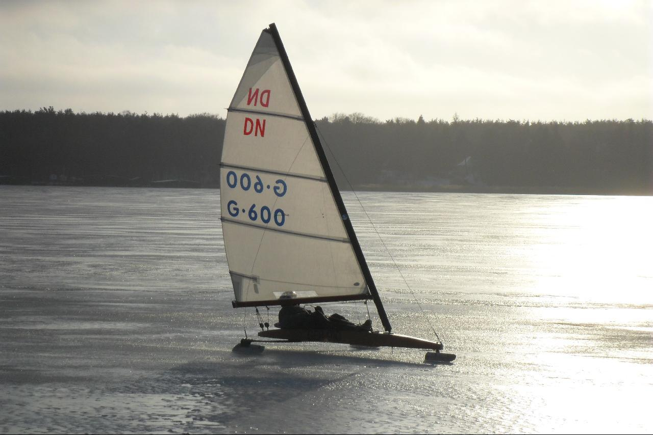 Eissegeln auf der Müritz